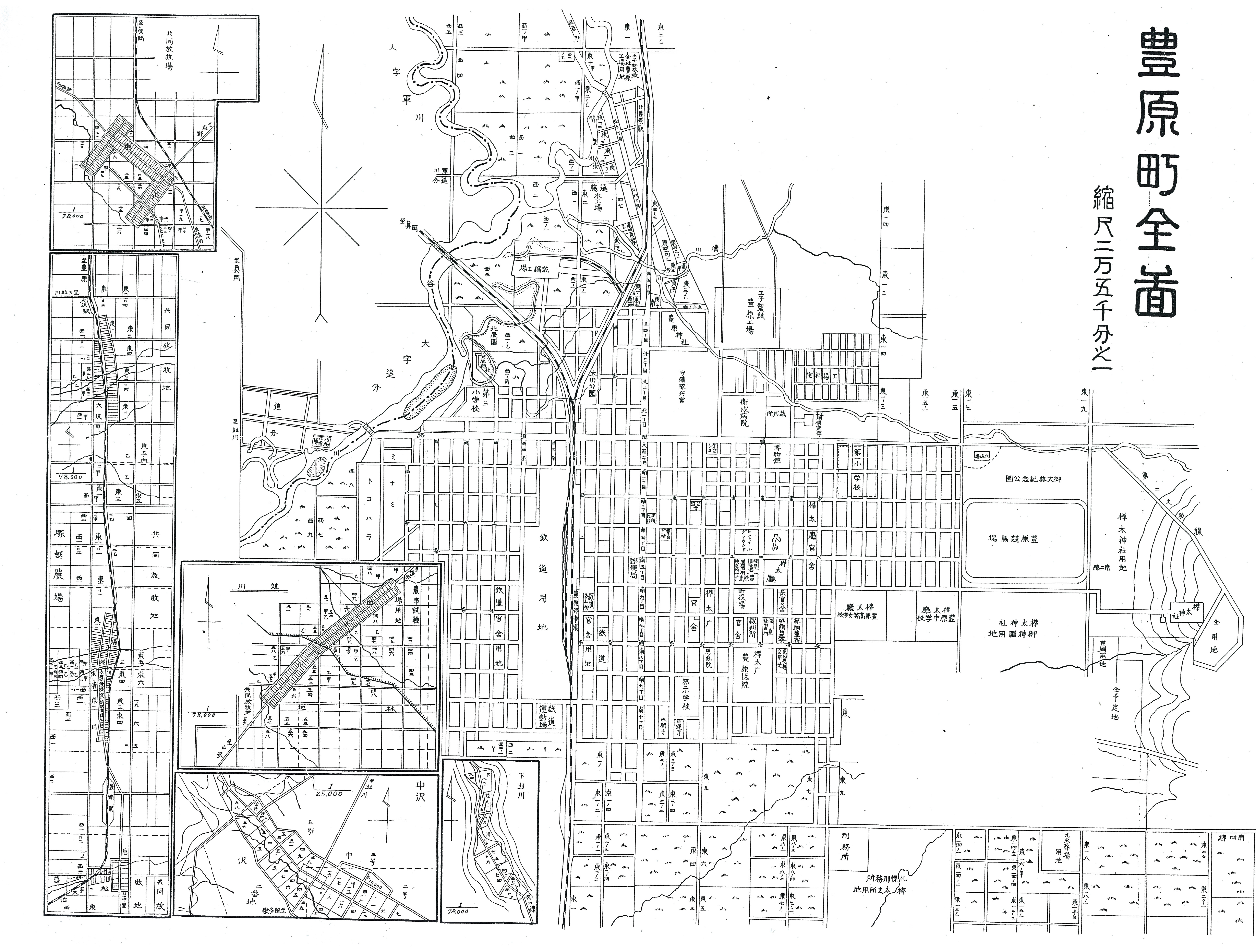 樺太 豊原町 1929年(昭和4年)市街地図